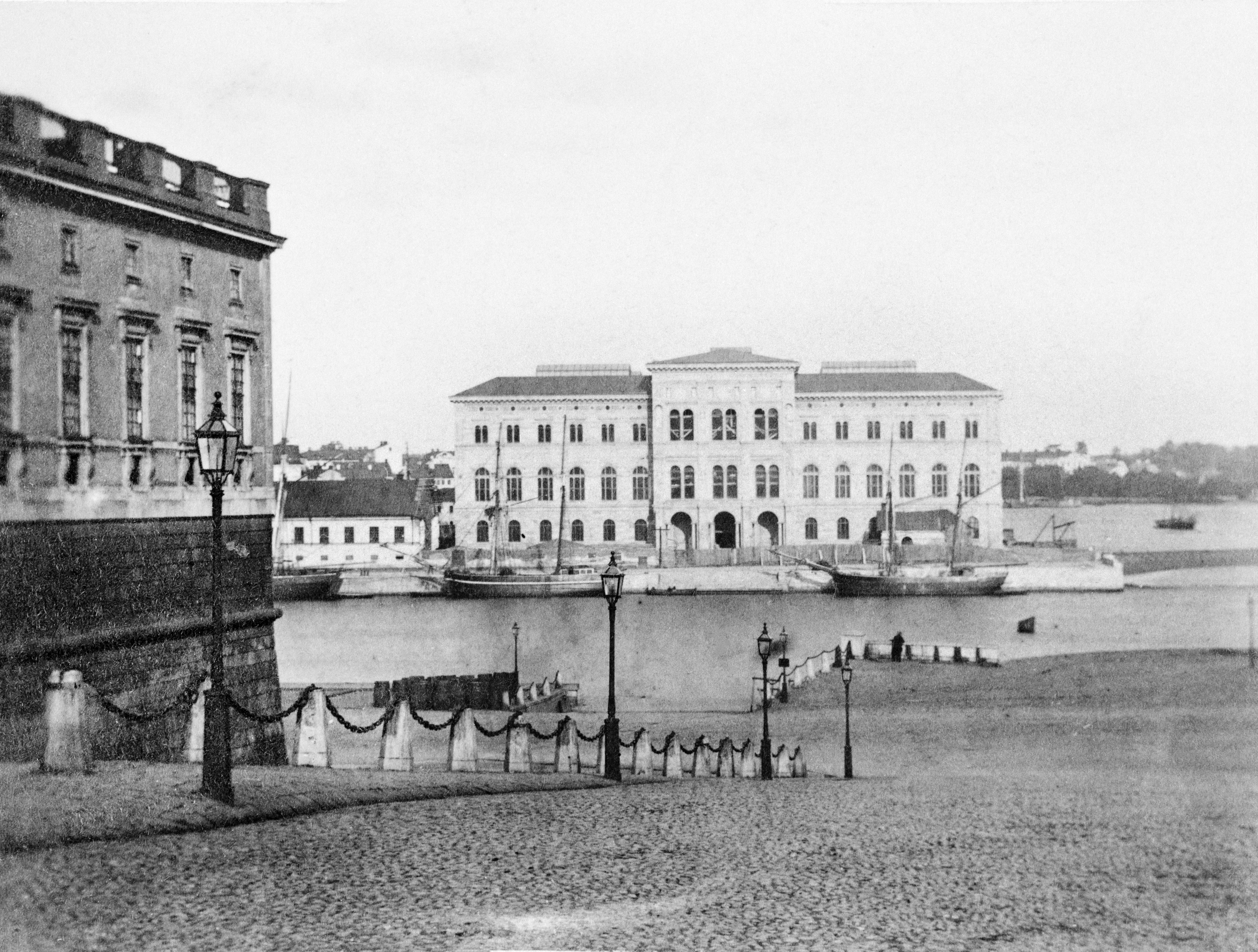 Slottsbacken i Stockholm